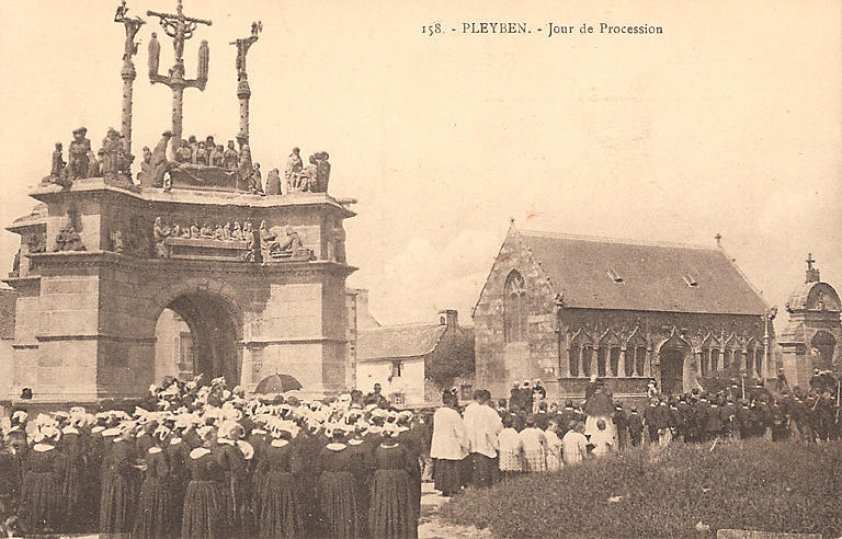 Jour de procession à Pleyben entre 1903 et 1920 (photo auteur inconnu, Musée national des arts et traditions Populaires